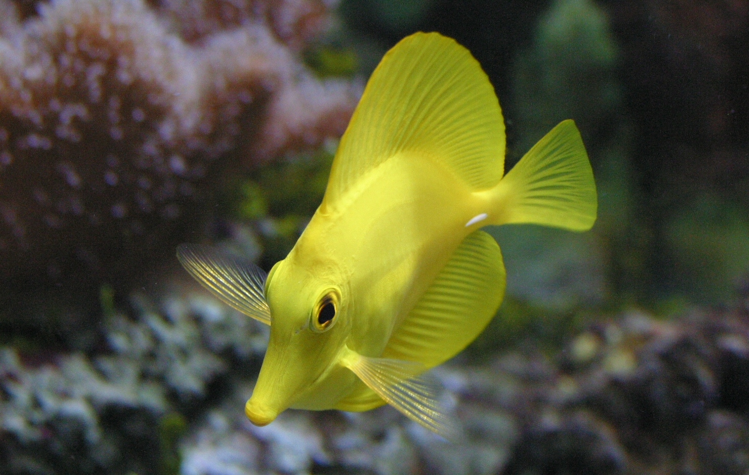 chirurgien jaune (Zebrasoma flavecens)